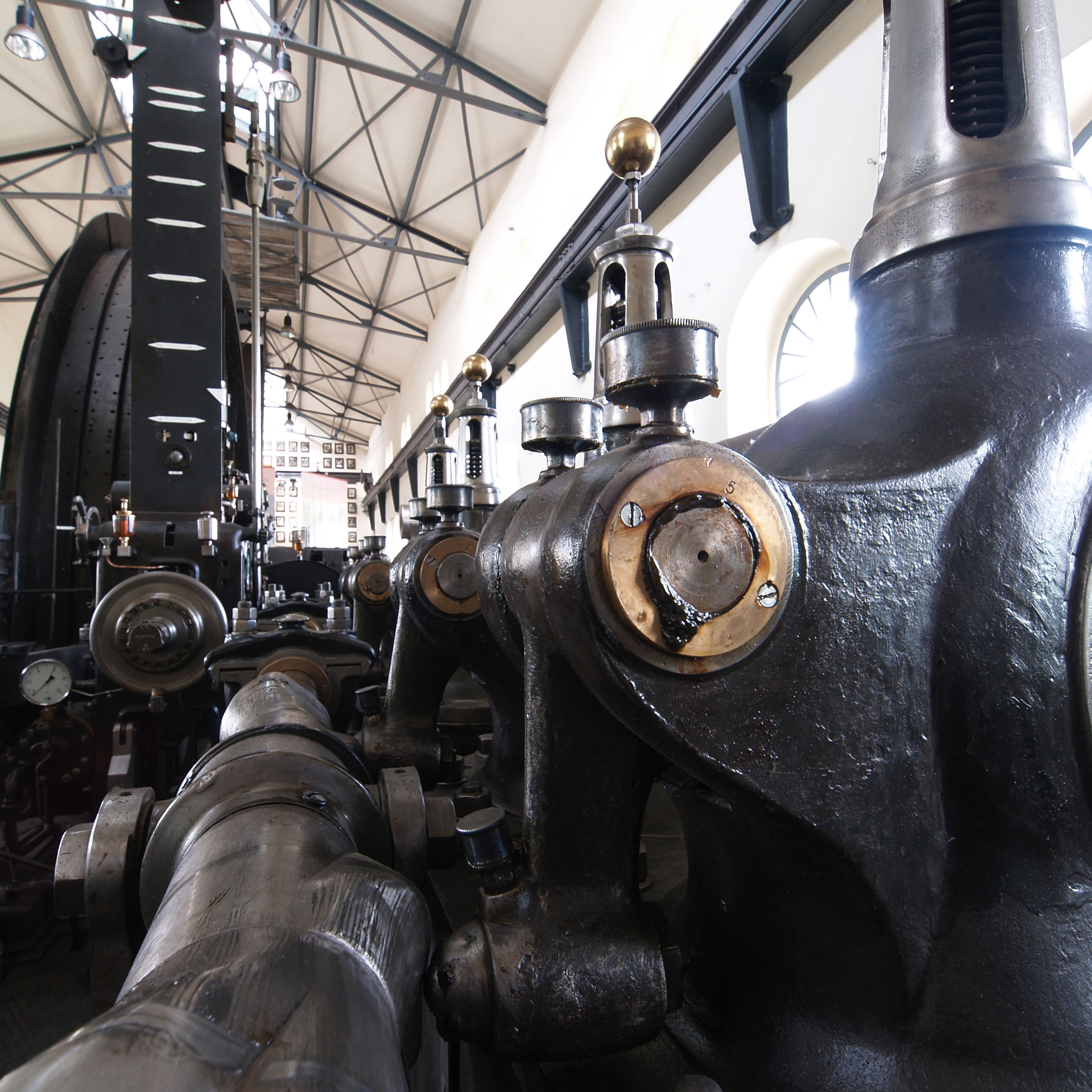 Staufferbuchse an der Fördermaschine der Zeche Hannover in Bochum, Germany